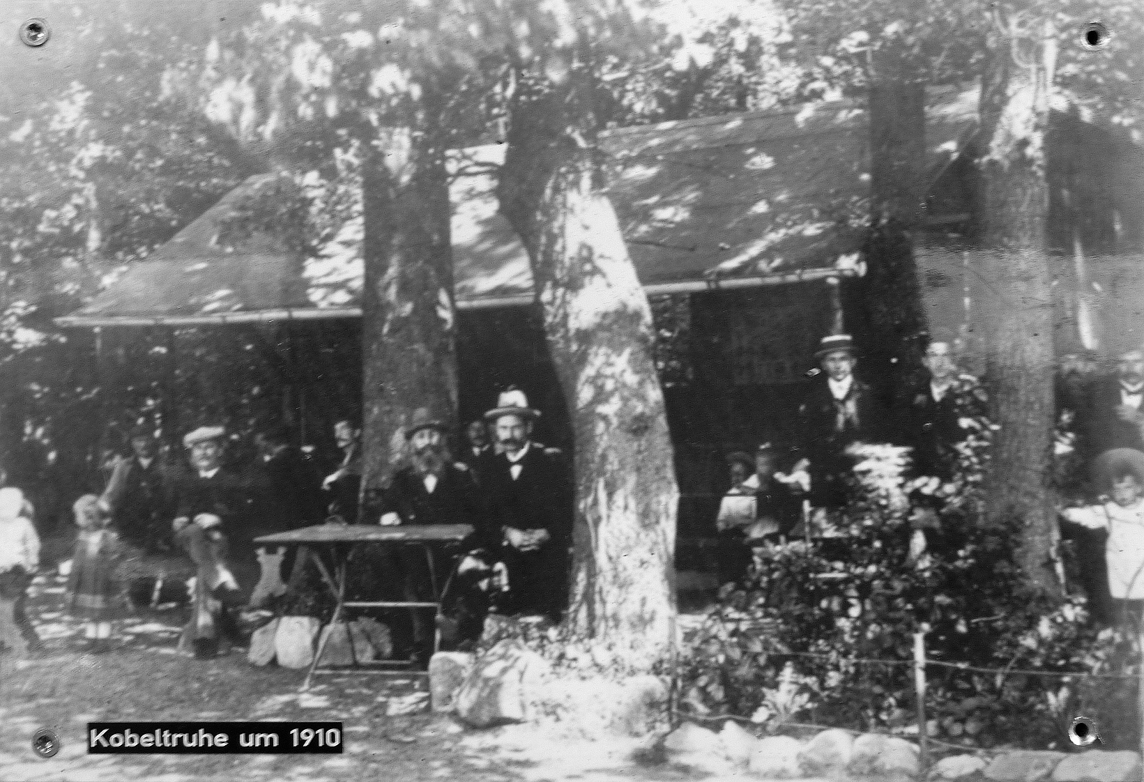 Schwanheim am Main, Herzogtum Nassau: Im Jahr 1908 hatte der Arzt, Autor und Zoologe (Malokologie) Wilhelm Kobelt (1840–1916) im Schwanheimer Wald eine der ersten Wald-Erholungsstätten Deutschlands initiiert. Im Bild die Einrichtung, Reproduktion eines Fotos aus dem Jahr 1910. 1921 wurde zu seinen und seiner Ehefrau Amalie Ehren vor Ort im Frankfurter Stadtwald die Gedenkstätte Kobeltruhe (auch Kobelt-Ruhe) eingerichtet – ein Rastplatz und Ausflugsziel mit Gedenkstein und Holzbänken. Das abgebildete Foto, Werk eines unbekannten Fotografen, ist dort ausgestellt auf einer Informationstafel des Historischen Wanderwegs Schwanheim zur Geschichte des Ortes